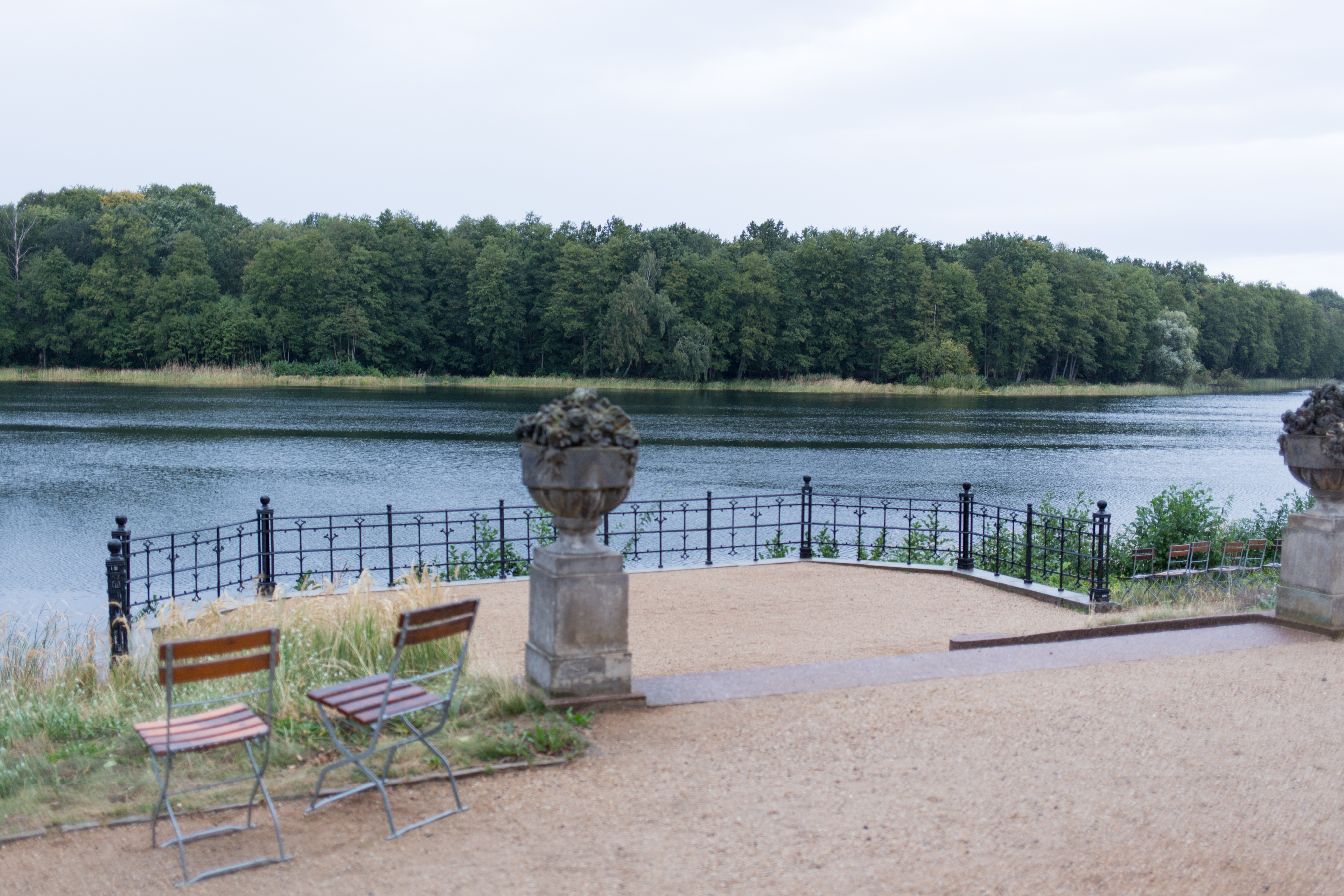 GLAM-on-Tour: Jagdschloss Grunewald Wikipedianer fotografierten am 21., 22. und 23. September 2018 im Jagdschloss Grunewald. This photo was taken during a project supported by WMDE. Gefördert von / Supported by: Wikimedia Deutschland, Stiftung Preußische Schlösser und Gärten Grunewaldsee vom Jagdschloss Grunewald aus gesehen.